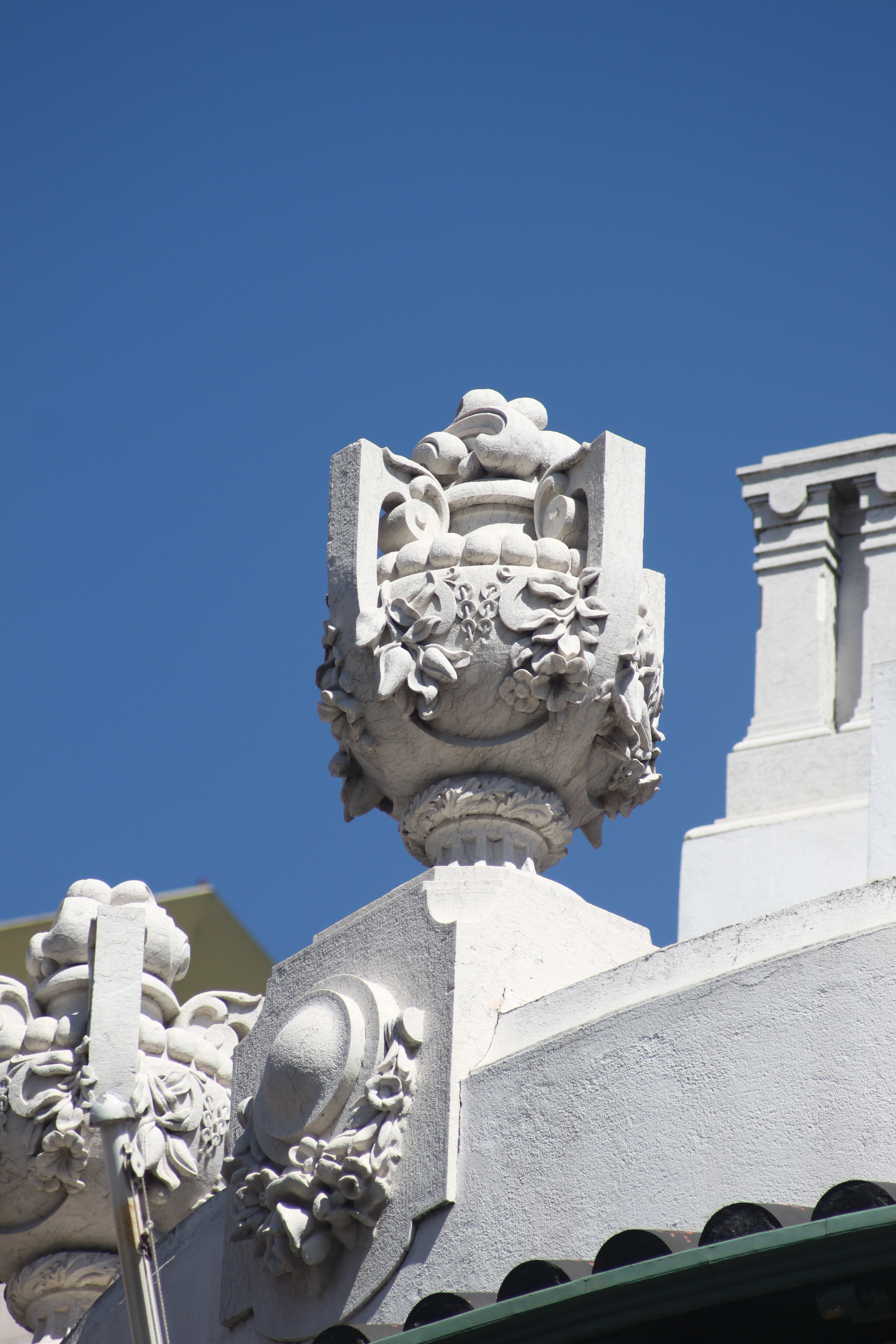 Moradia na avenida Fontes Pereira de Melo, incluindo as áreas do antigo jardim, anexo residencial e garagem, actual sede social do Metropolitano de Lisboa This file was uploaded for Wiki Loves Monuments in Portugal with the unique identifier 71713. This monument is classified as Imóvel de Interesse Público. This building is classified as Imóvel de Interesse Público.